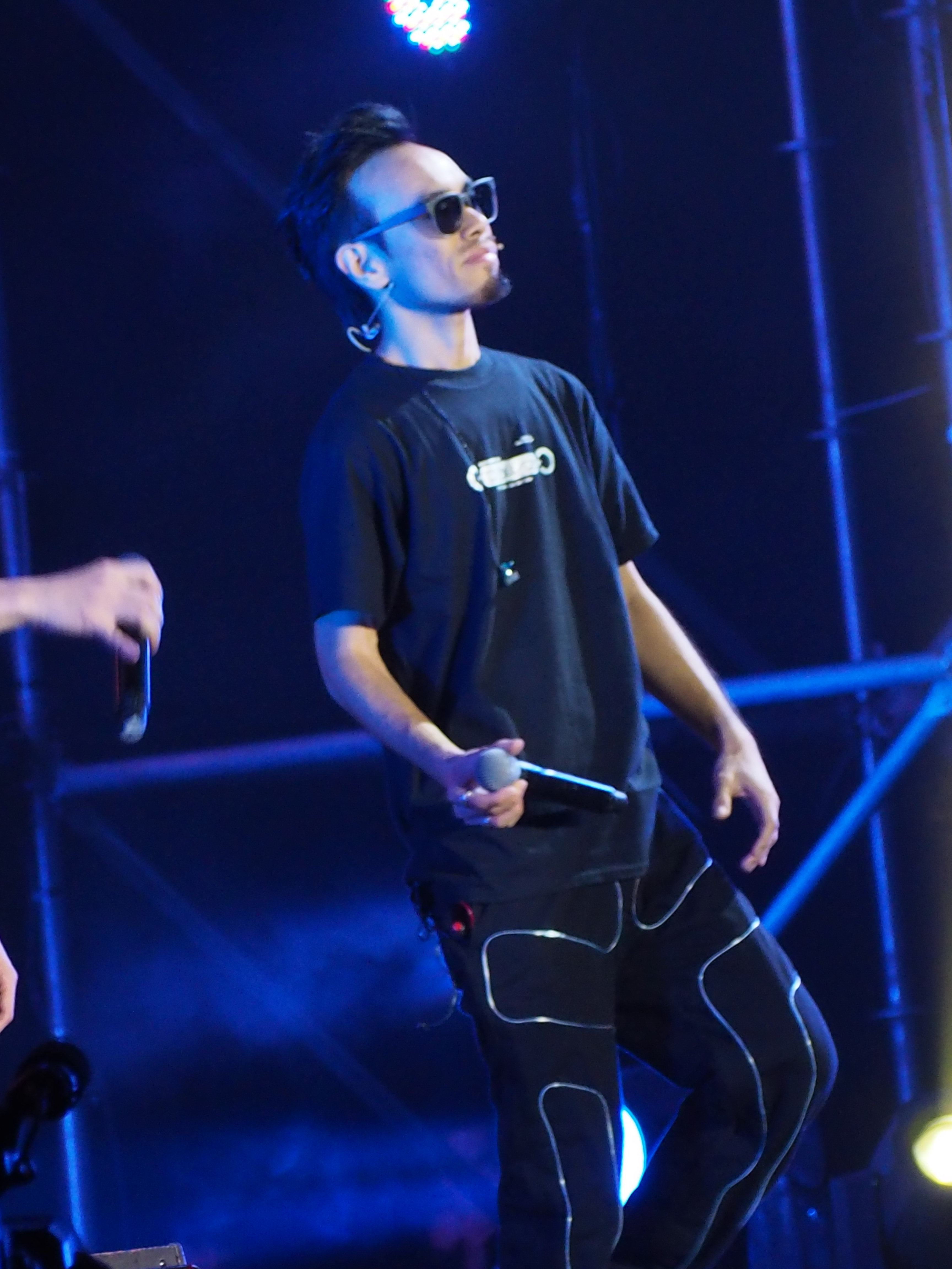 Jase @ C AllStar 2016 C AllStar 廣州天梯演唱會